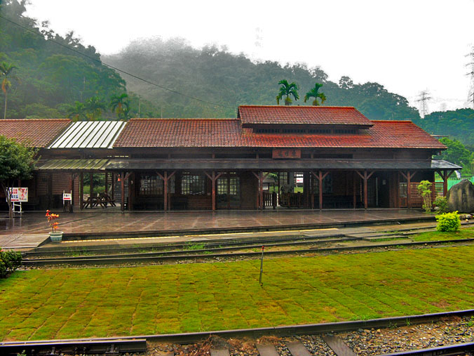 臺灣鐵路管理局集集線車埕車站。